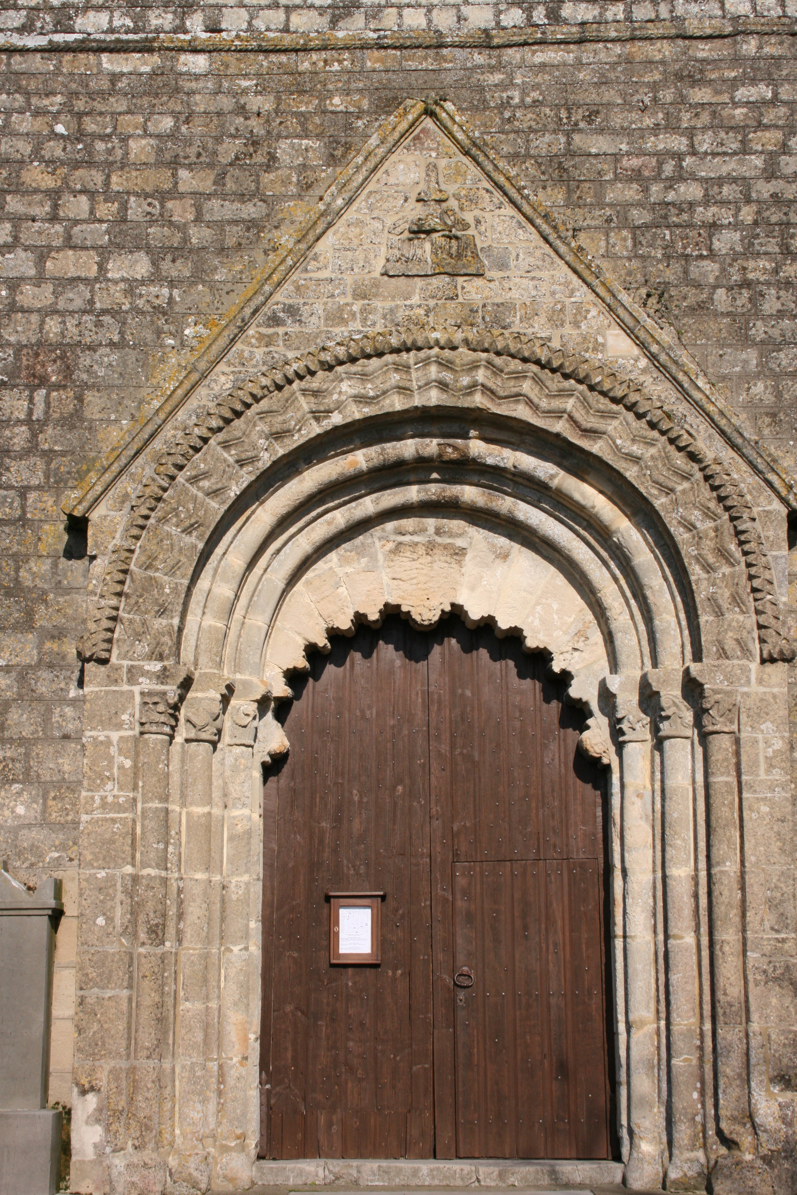 Église du Wast, département du Pas-de-Calais, France.